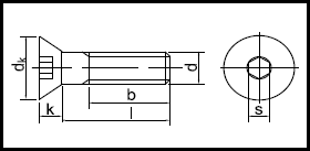 DIN 7991